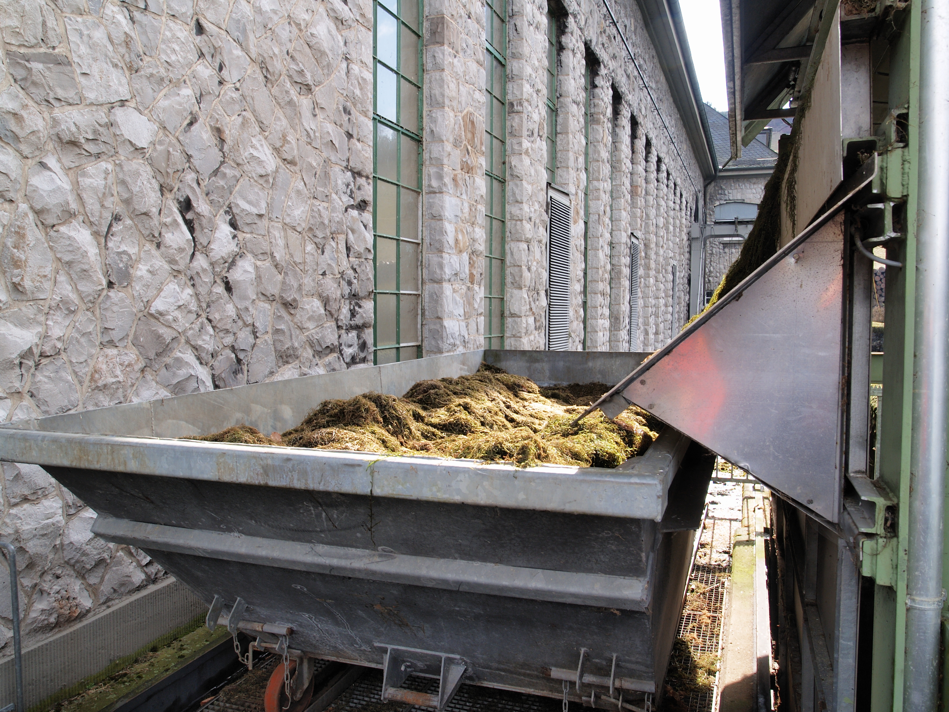 Der Sauerlandstammtisch besichtigt die Sorpetalsperre, Kanadische Wasserpest vom Rechen vor dem Einlauf für die Rückpumpen (Speicherfunktion) aus dem Ausgleichsweiher